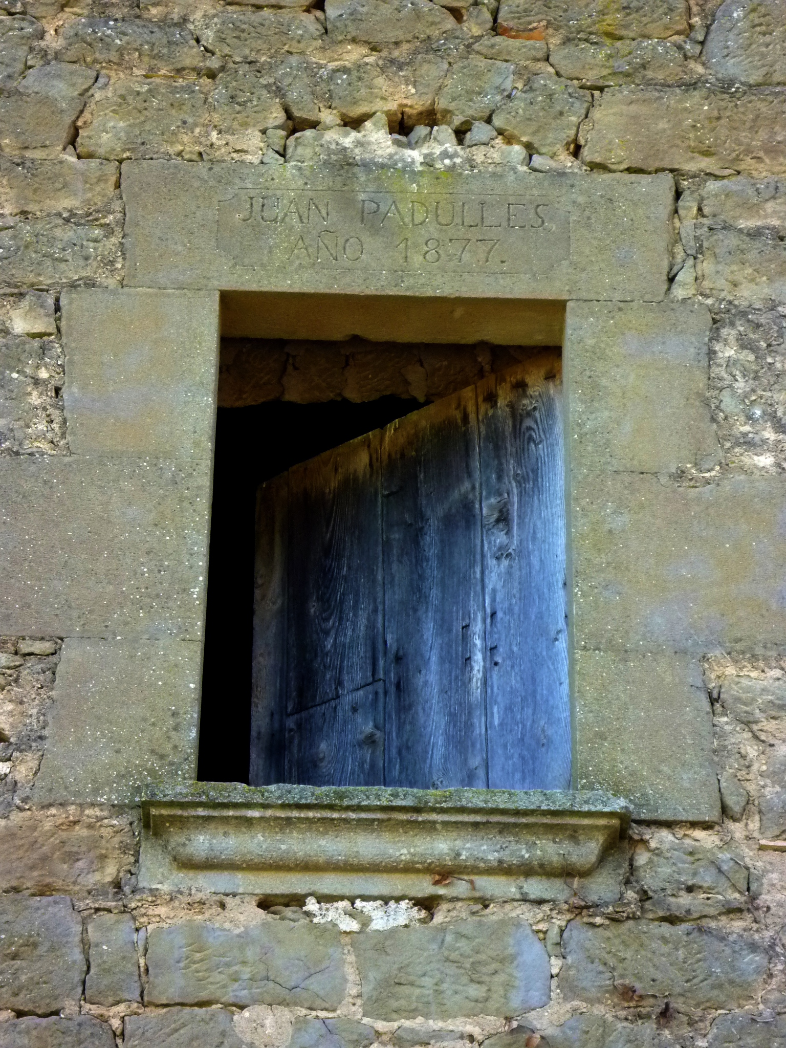 Les Feixes de Puig-redon (Torà): inscripció en una finestra